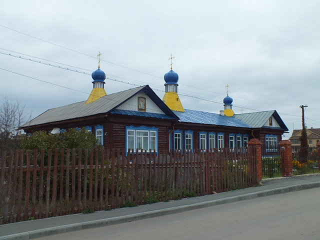 Чебаркульская православная воскресная школа (Дом молитвы)